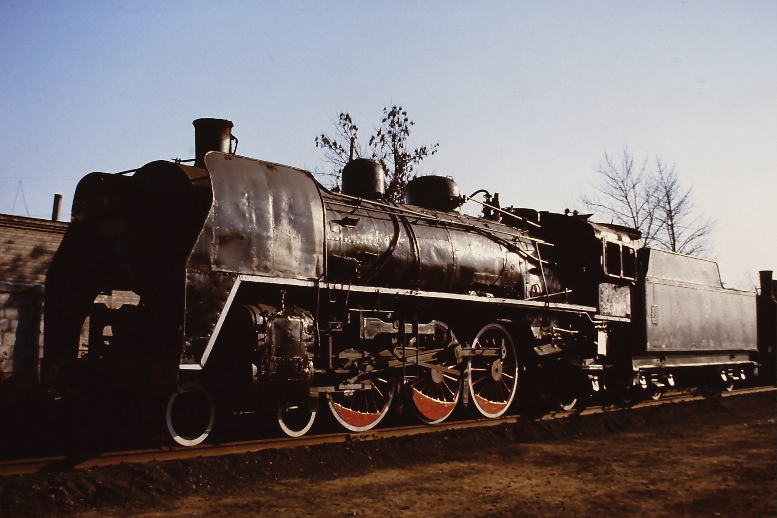 CNR SL5-292 (Dampflokomotivmuseum Shenyang)